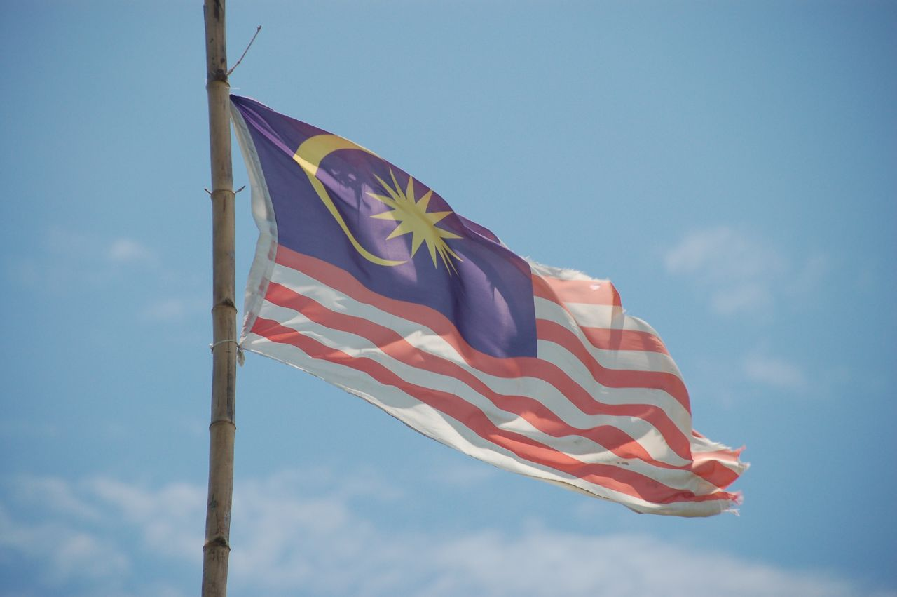 Malaysian Flag